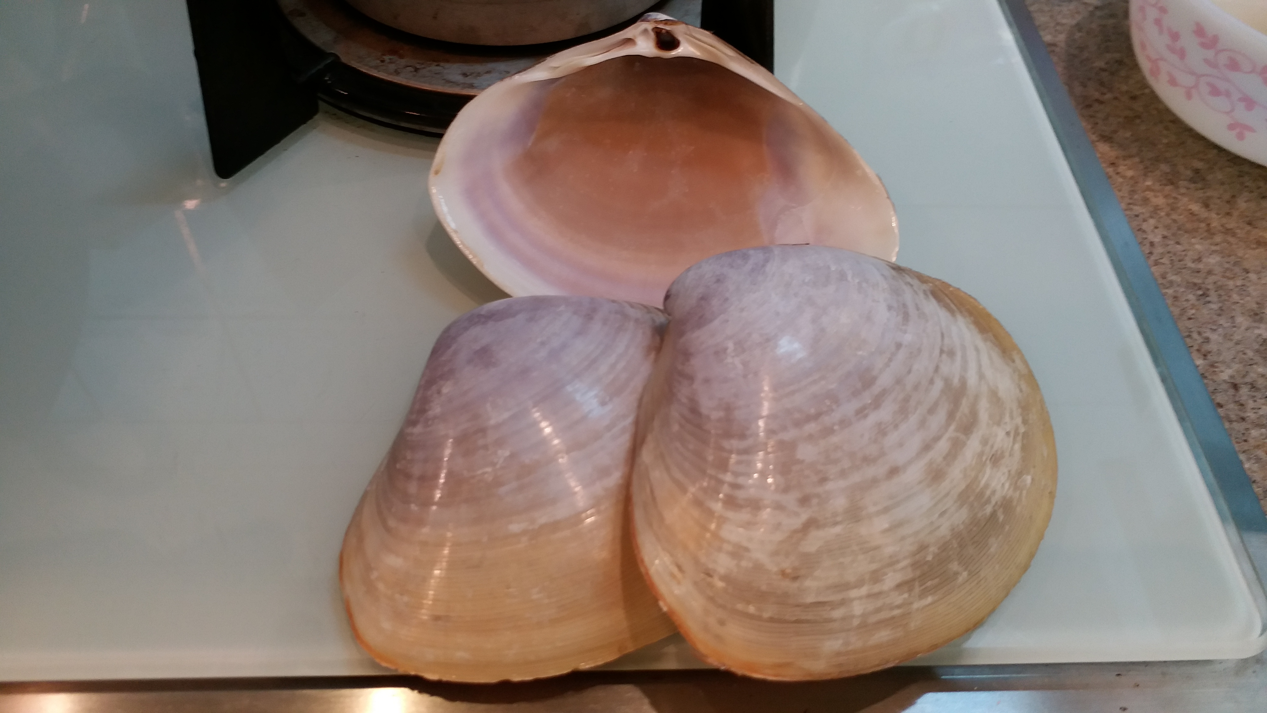 三枚貴妃蚌的半邊殼。